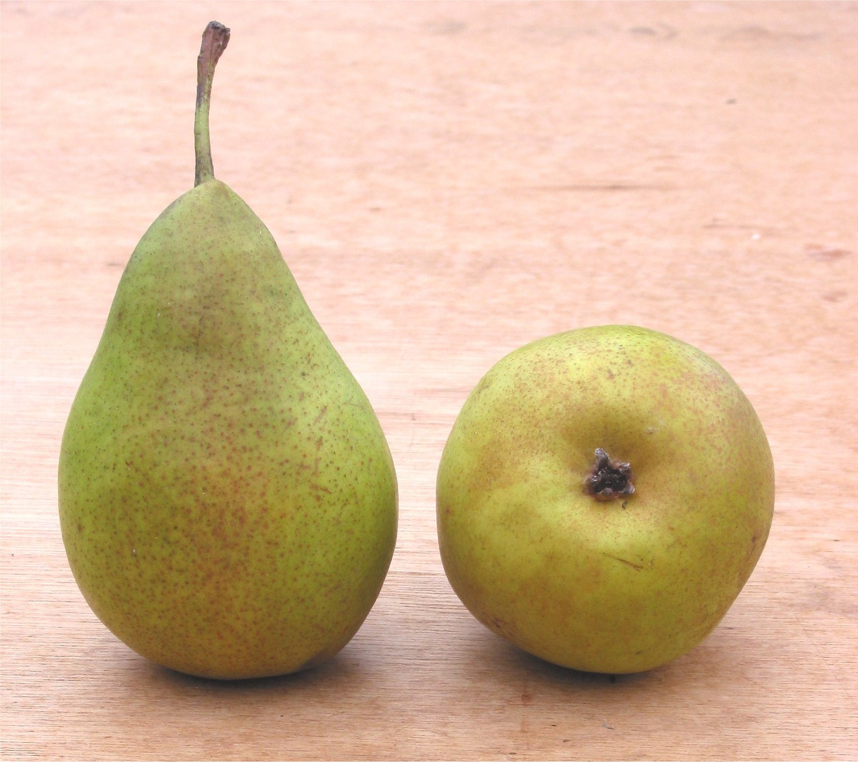 (Peer) Pyrus communis 'Bonne Louise d'Avranches'